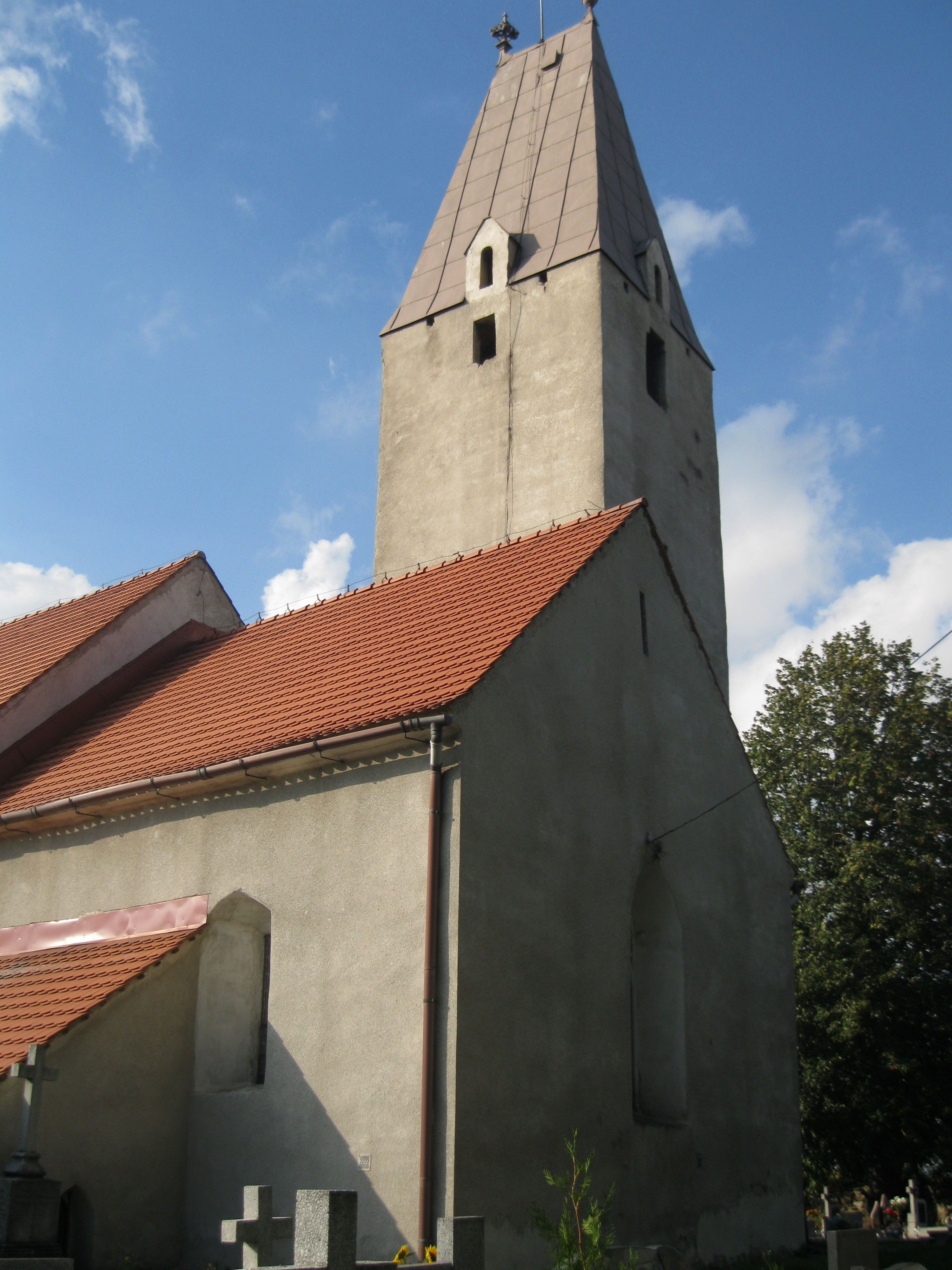 Piotrowice Świdnickie - kościół filialny p.w. Podwyższenia Krzyża Świętego (zabytek nr rejestr. A/1910/780/Wł)